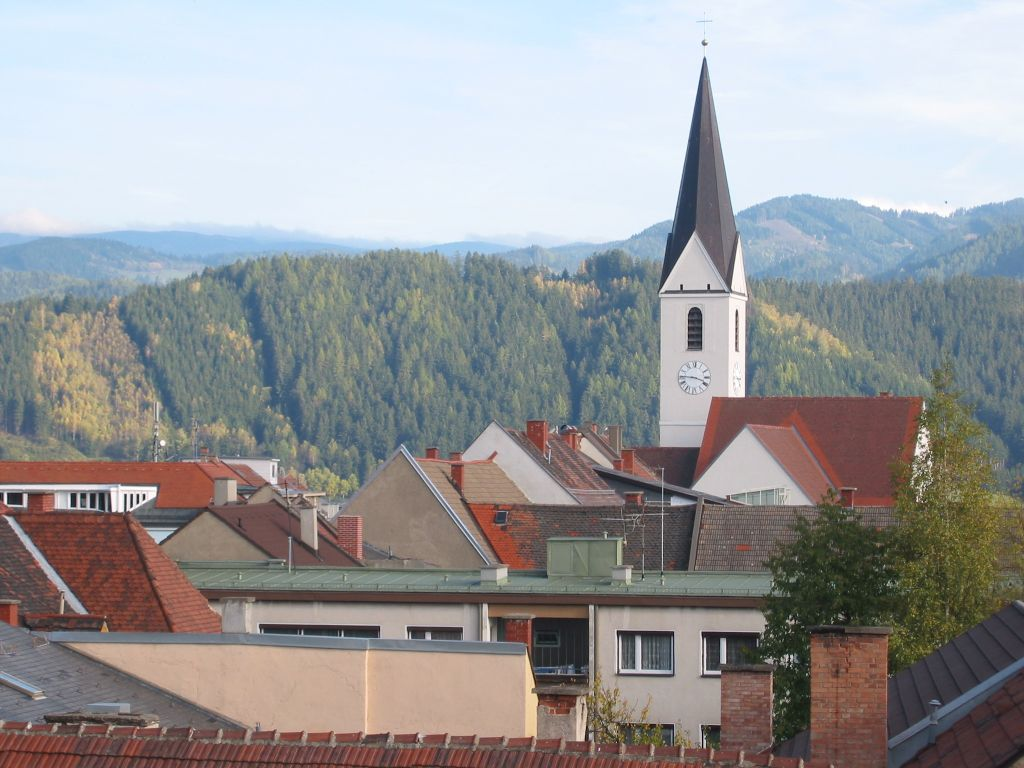 Knittelfelder Stadtpfarrkirche